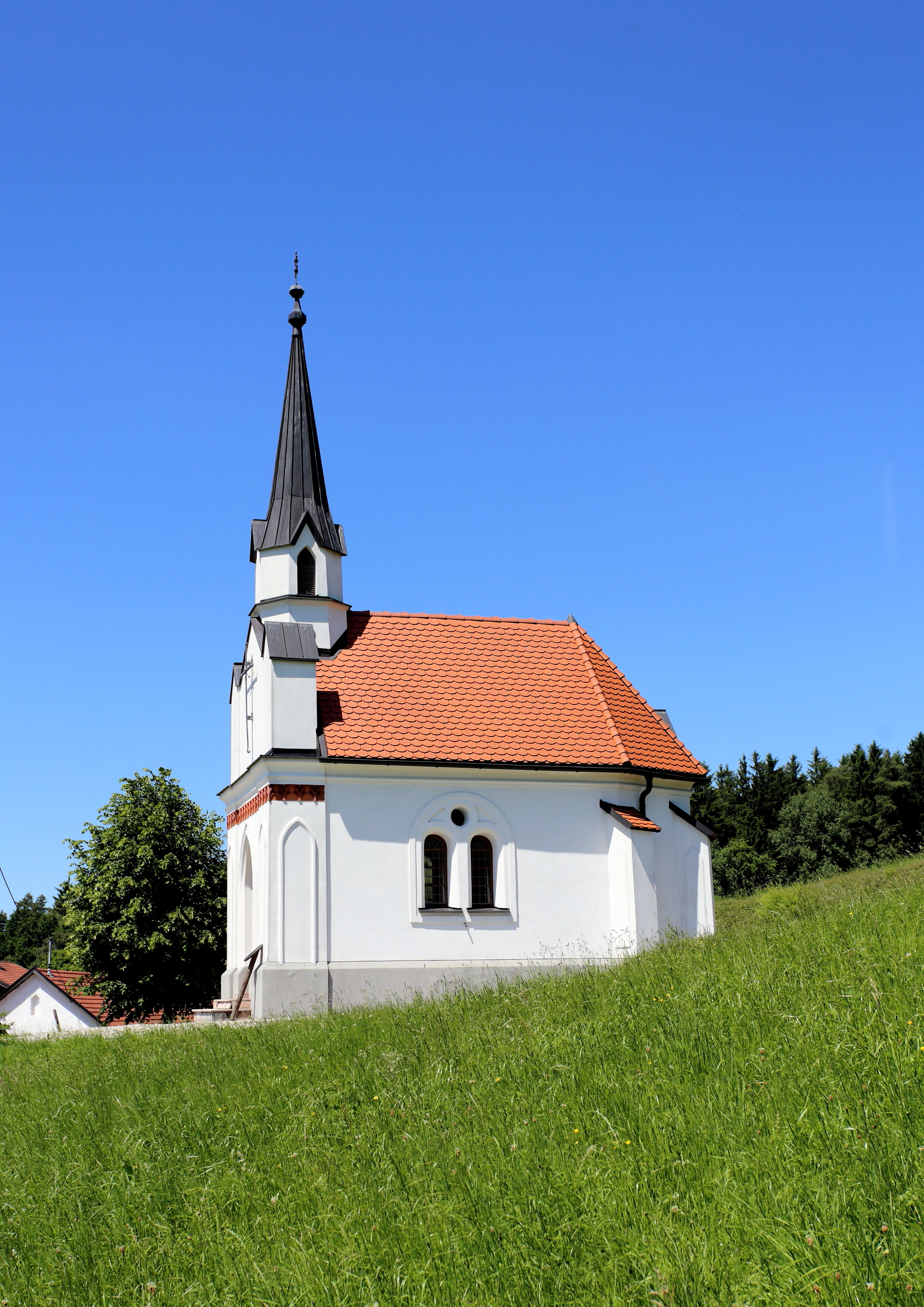 Thalleidlkapelle bei Reisach 6 in der oberösterreichischen Gemeinde Moosbach. Eine neogotische Kapelle, die 1850/51 der Thalleidlbauer Johann Priewasser errichten ließ.